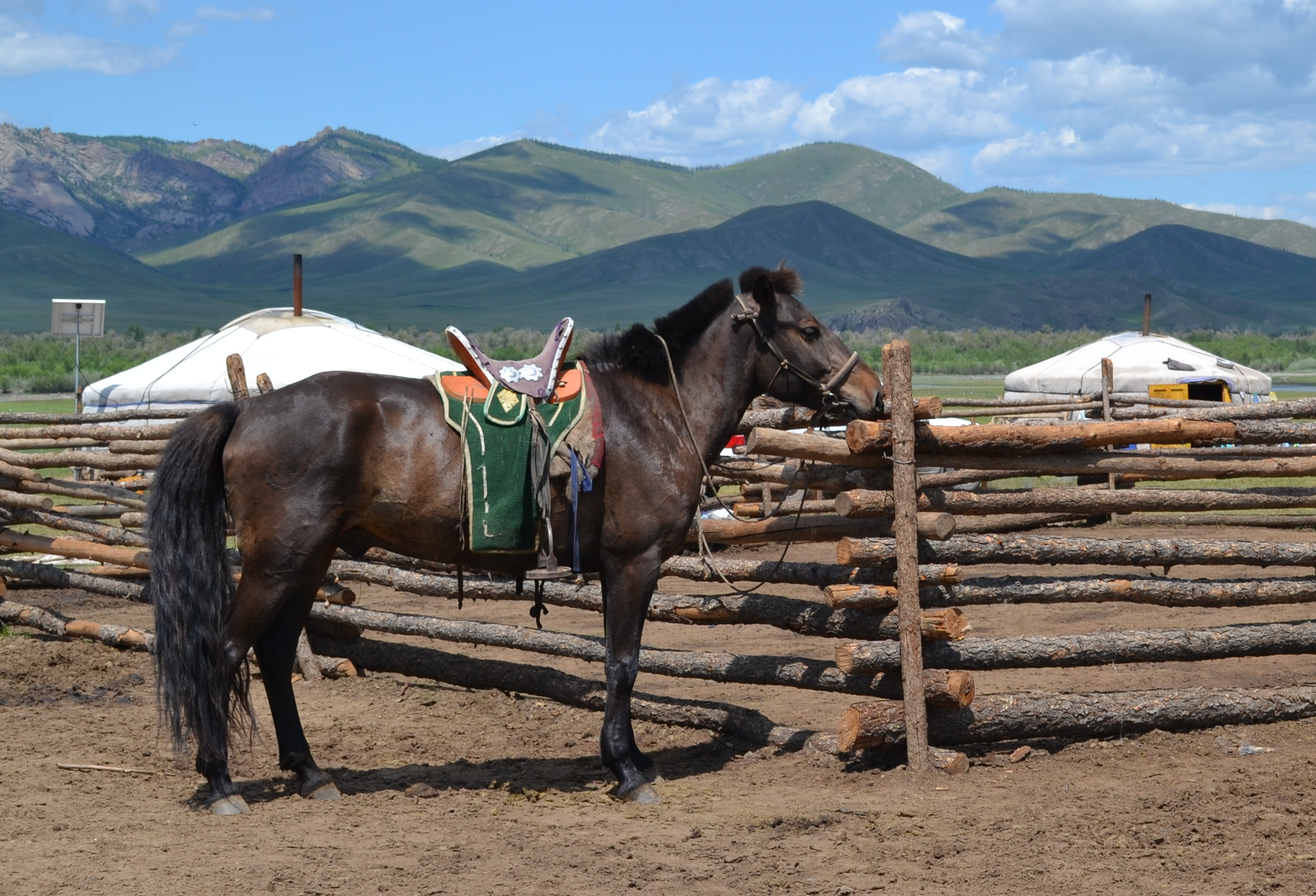 Стоянка кочевника. В окрестностях Дархана. Центральная Монголия